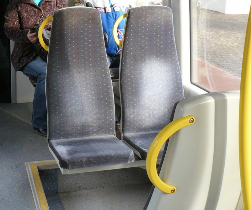 Fotele w elektrycznym zespole trakcyjnym ED59-01.